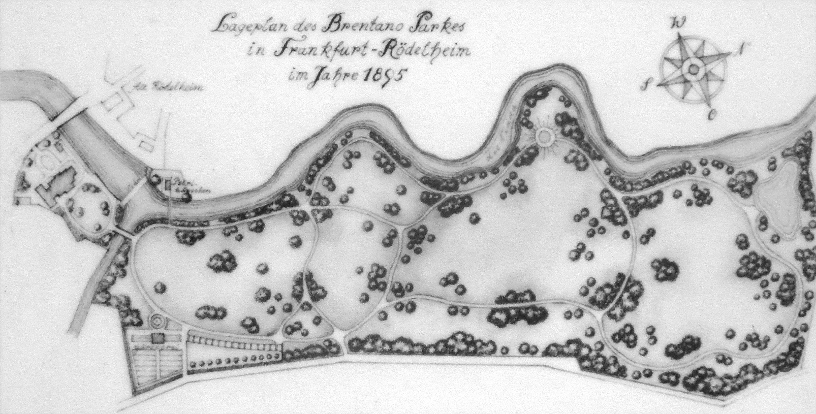 Frankfurt am Main, Stadtteil Rödelheim: Der Brentanopark ist eine auf das Jahr 1770 zurückgehende Grünanlage. Lageplan des Parks von 1895.